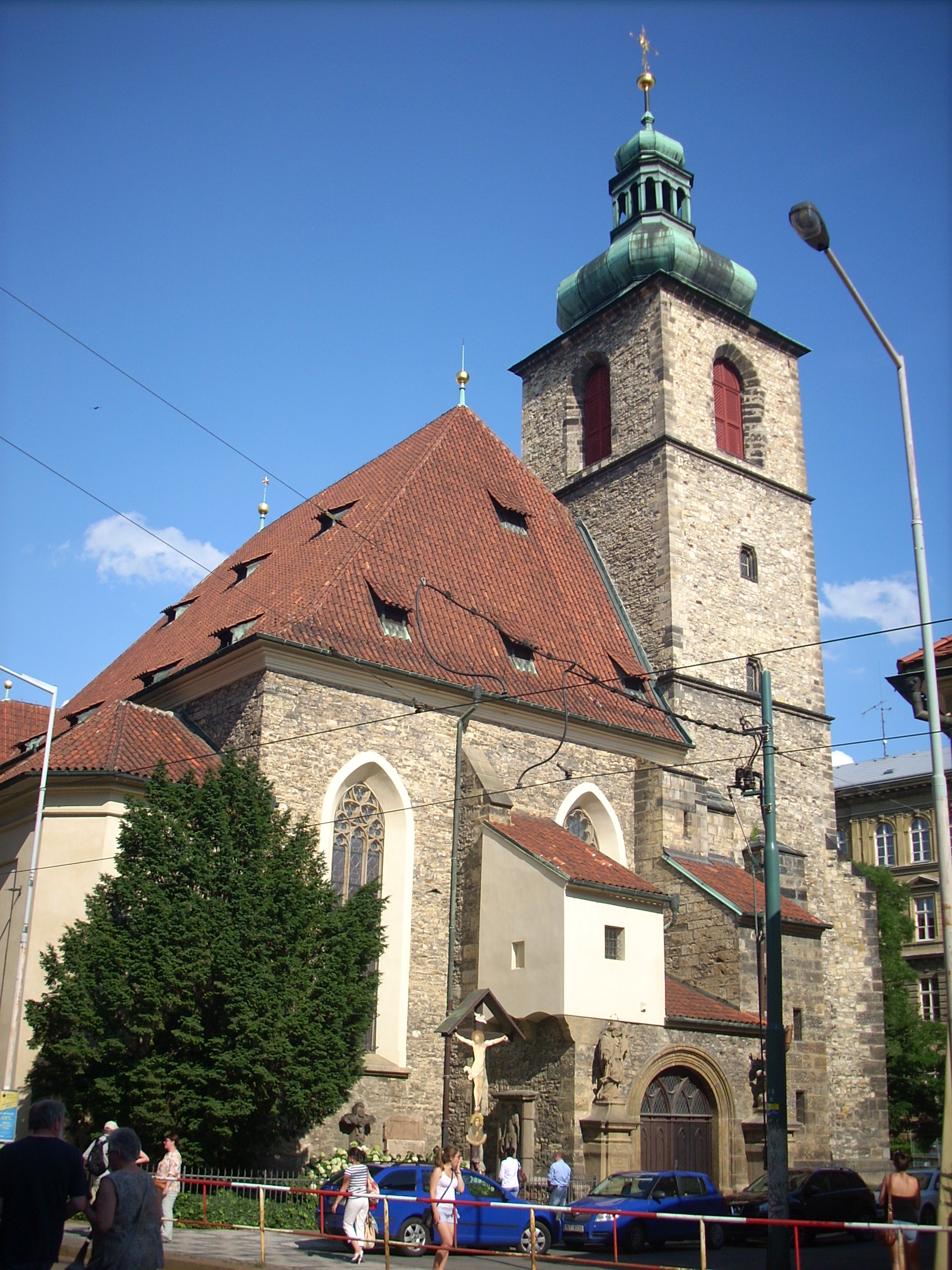 Kostel sv. Jindřicha a sv. Kunhuty se Svatojindřišskou zvonicí, Praha 1, Jindřišská